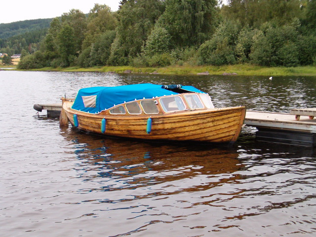 trebåt